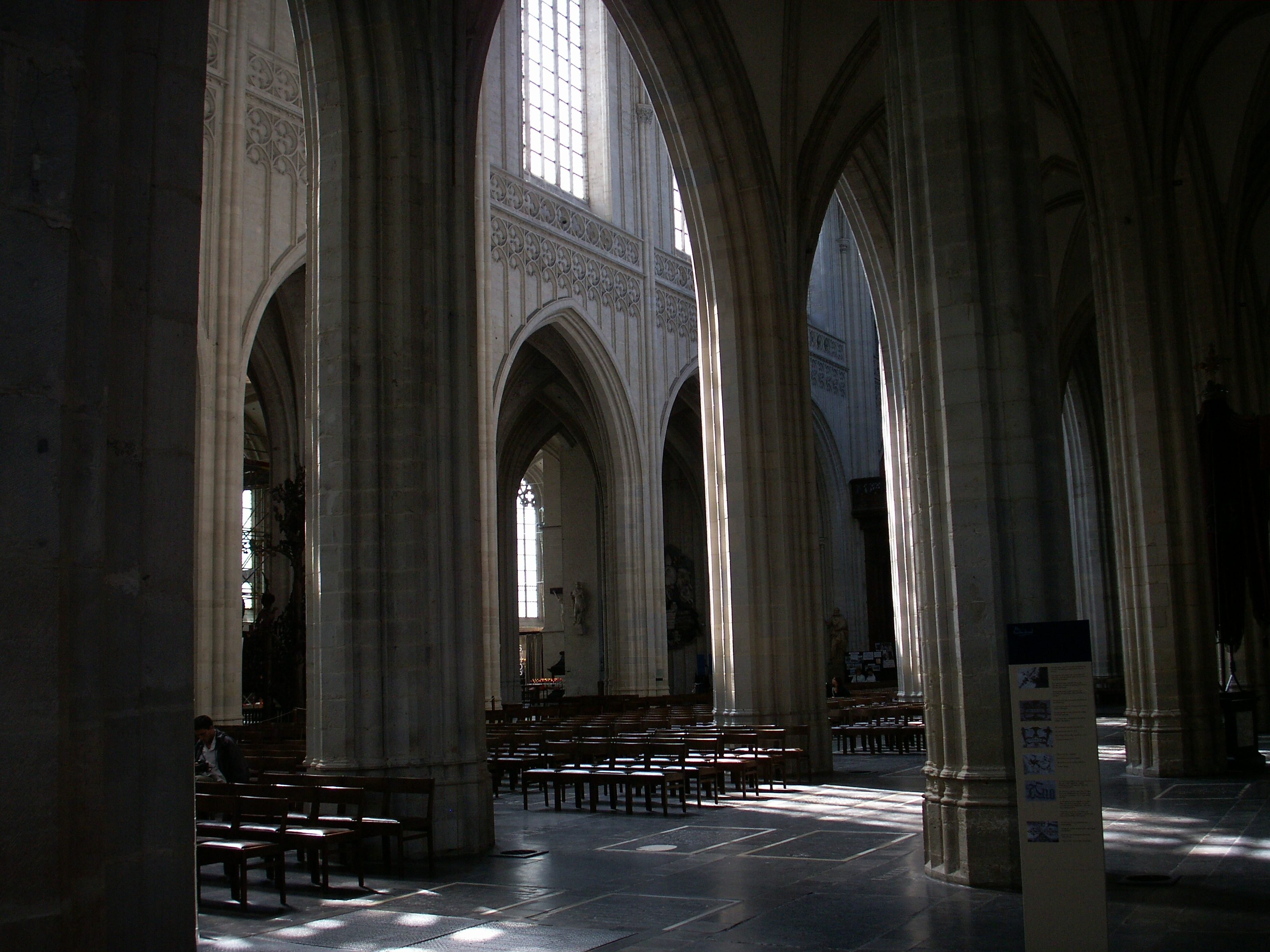 Liebfrauenkathedrale (Antwerpen), Inneres